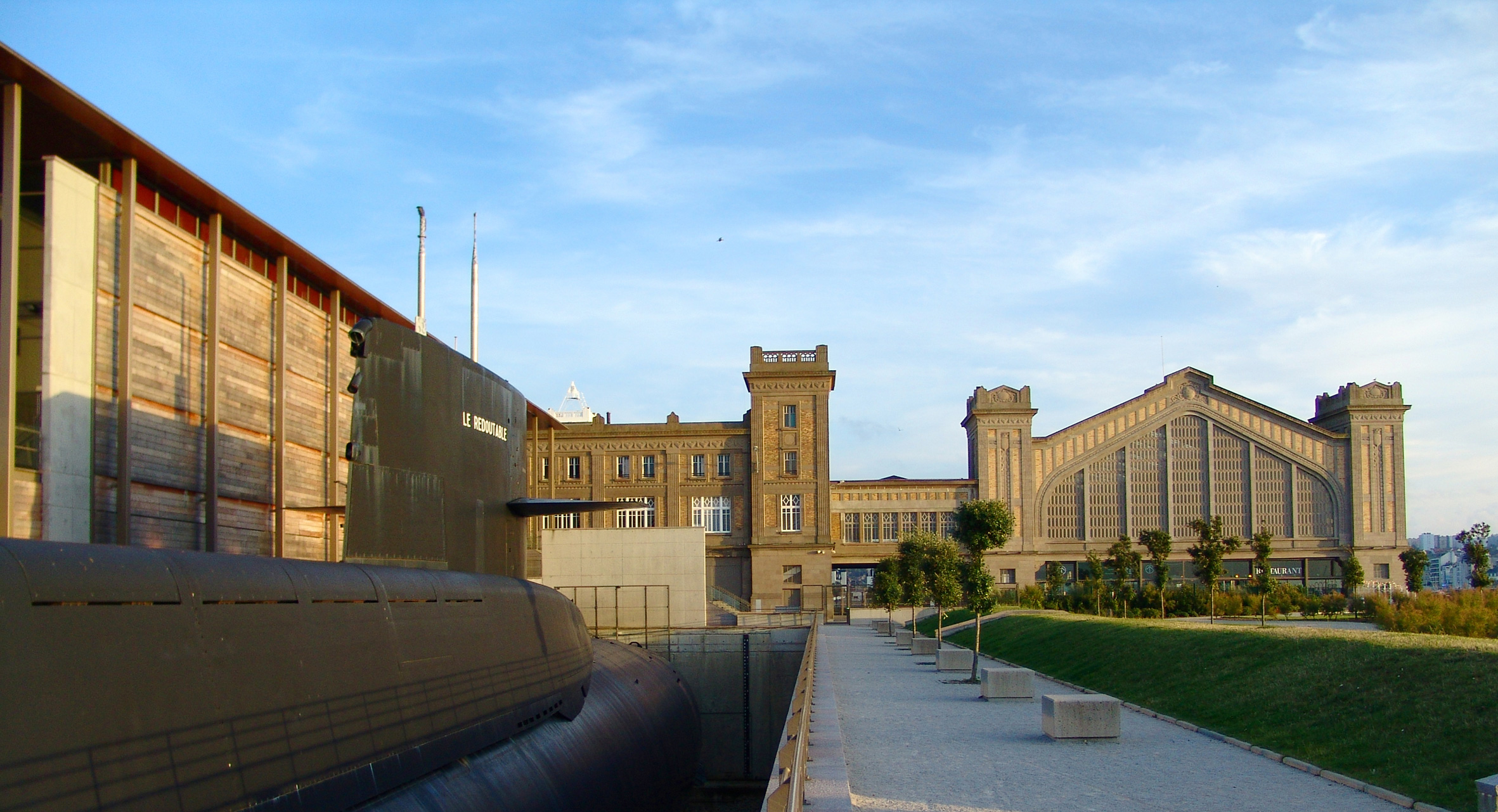 Vue d'ensemble de La Cité de la Mer à Cherbourg avec le Pavillon des Expositions Permanentes, le sous-marin nucléaire lanceur d'engins Le Redoutable et la Gare Maritime Transatlantique.